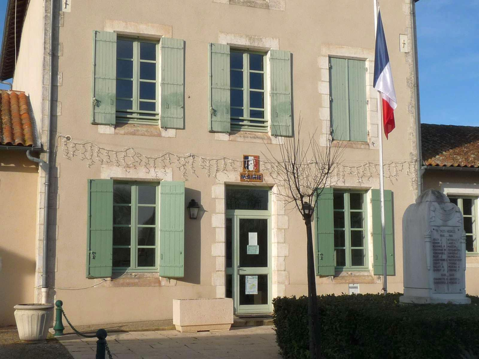 mairie de Petit-Bersac, Dordogne, France